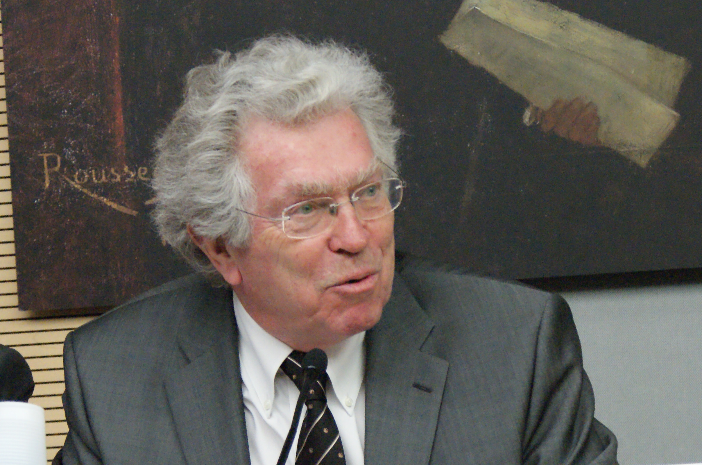 audition de pierre joxe à l'assemblée nationale